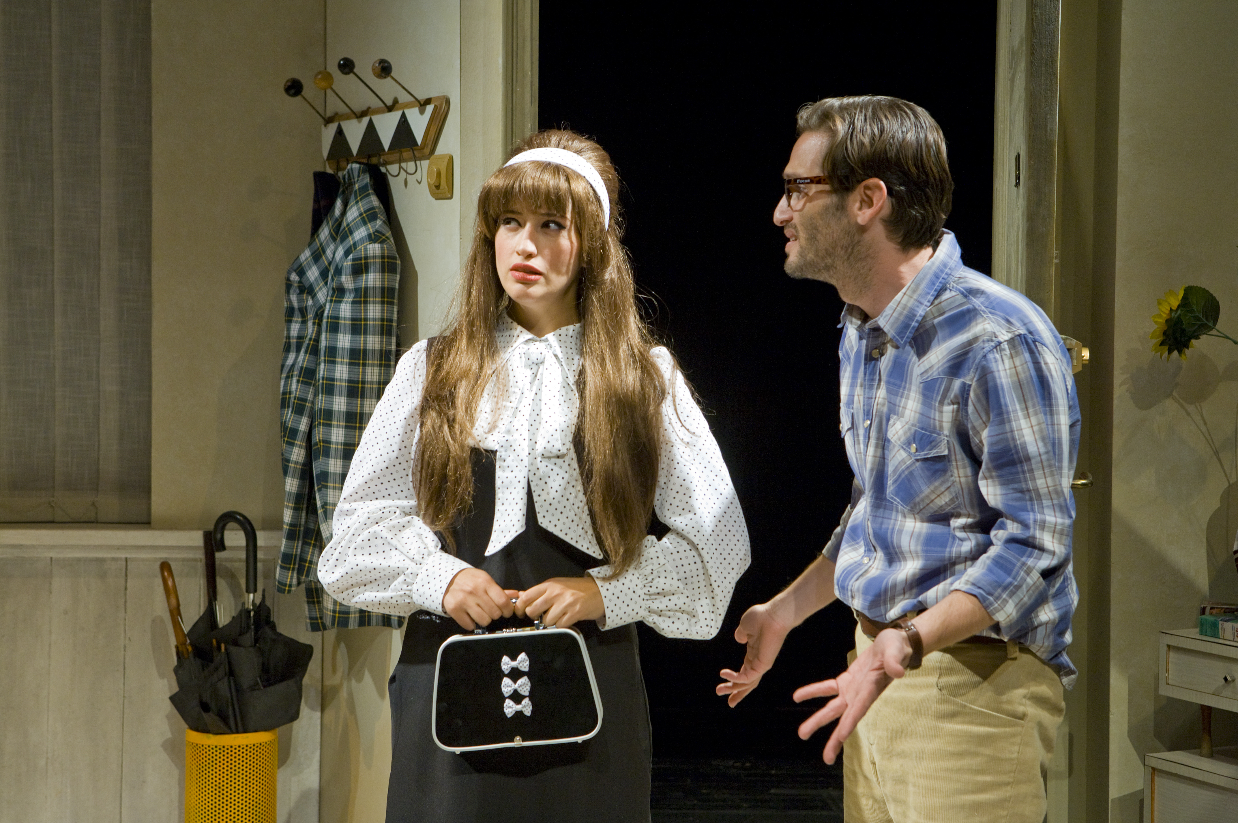 מירב שירום מההצגה "שחק אותה סם"